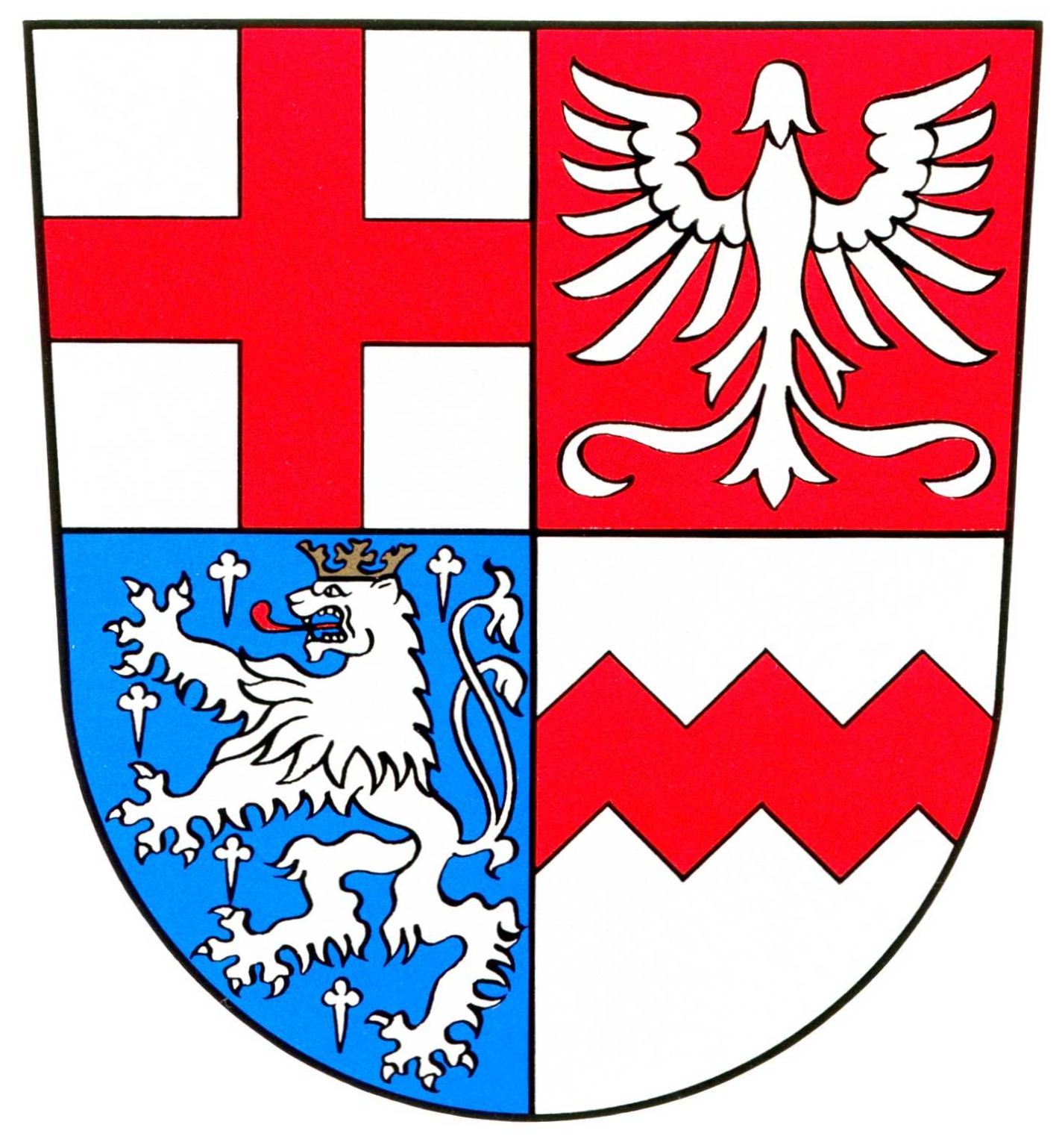 Wappen der Gemeinde Illingen/Saar